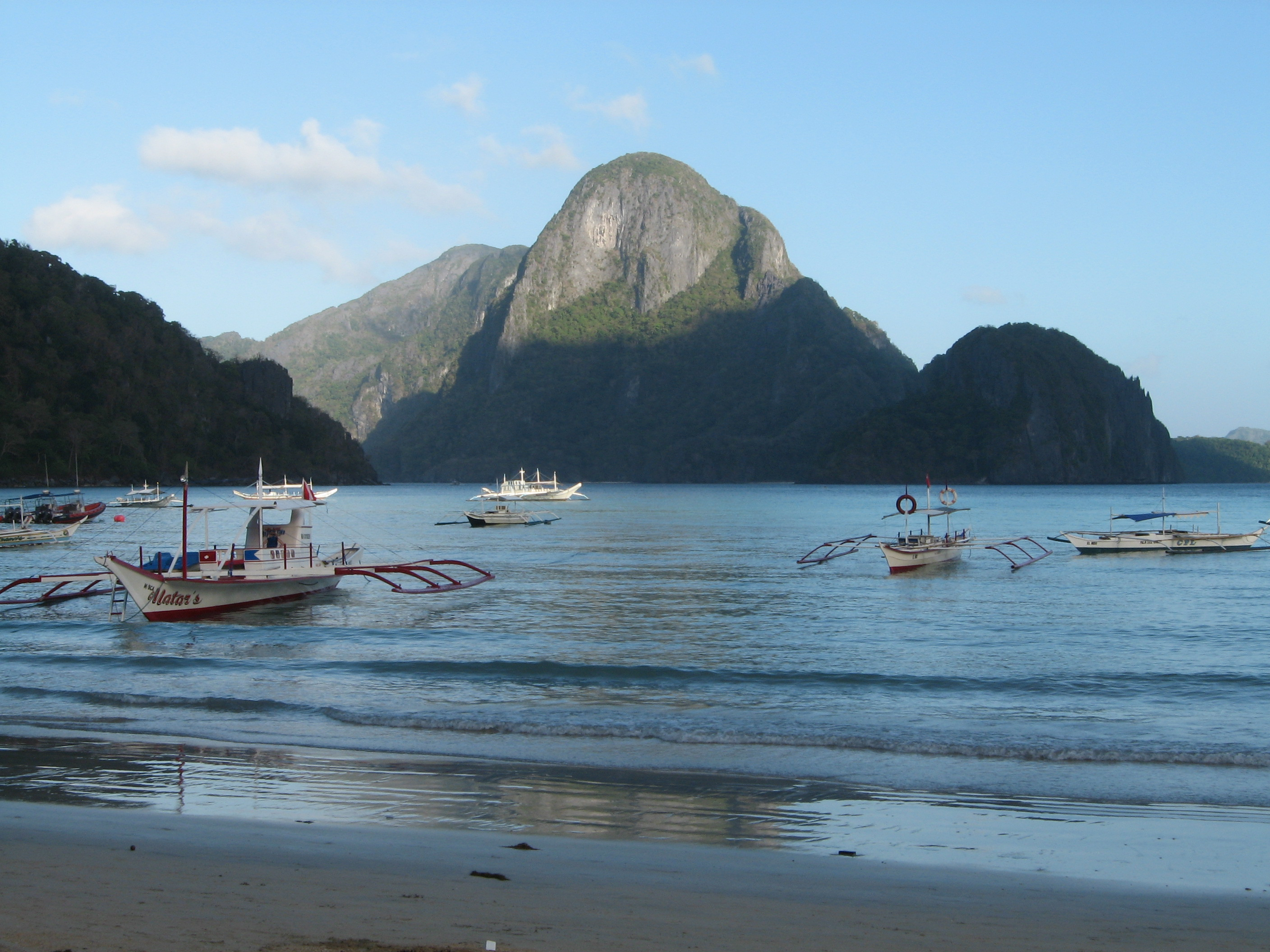 El Nido, Palawan, Philippines